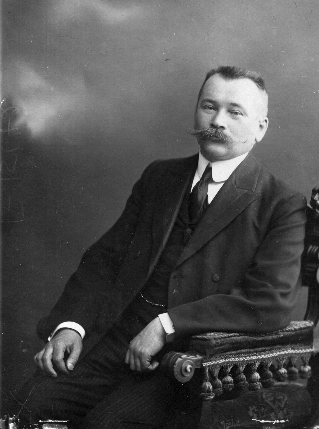 Васильев, Александр Александрович (историк)